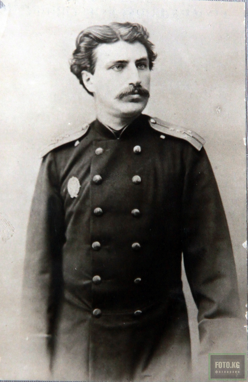 Николай Михайлович Пржевальский в 1860 году